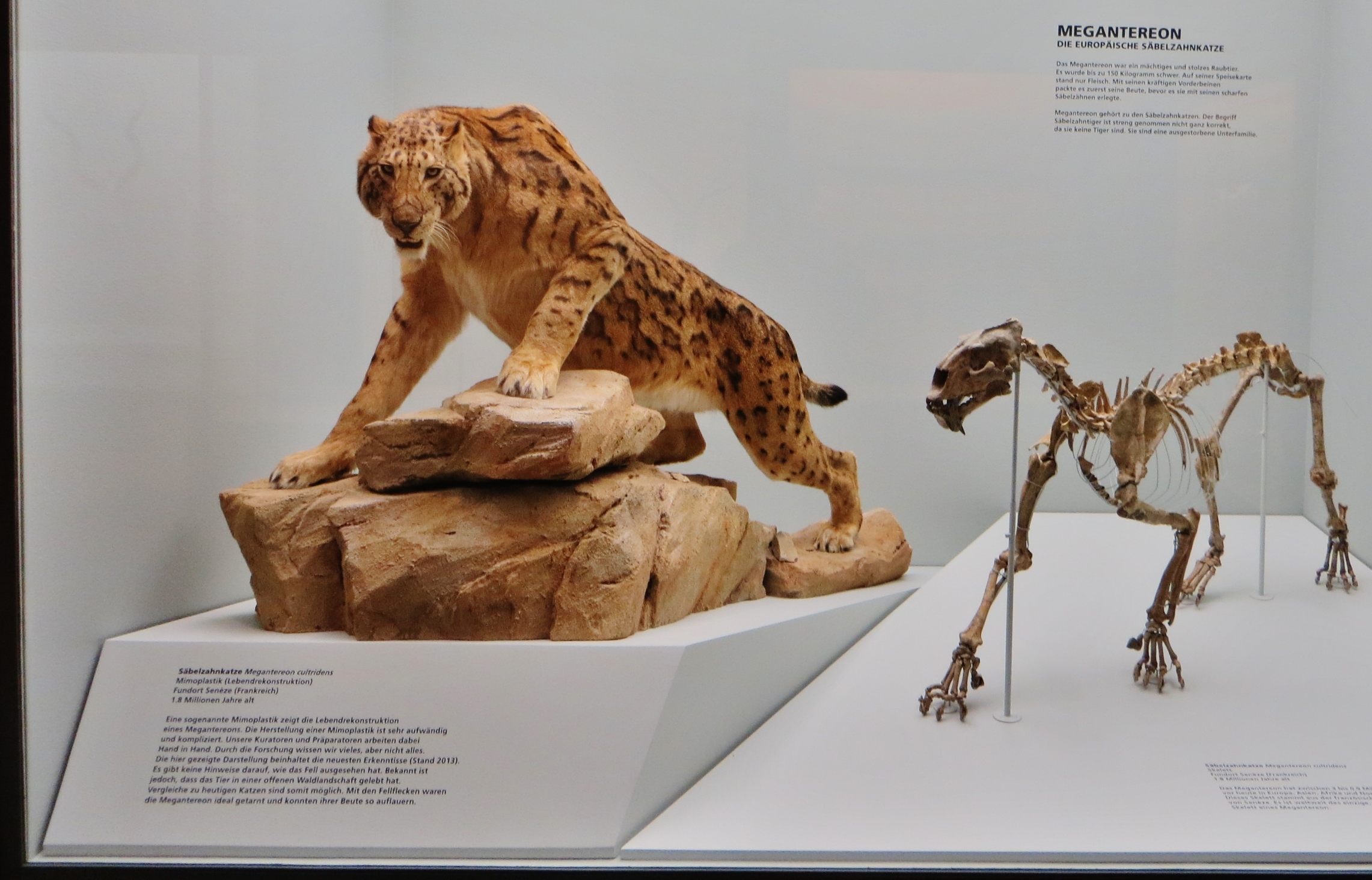 Fossil and model of Megantereon - Took the picture at Natural History Museum, Basel